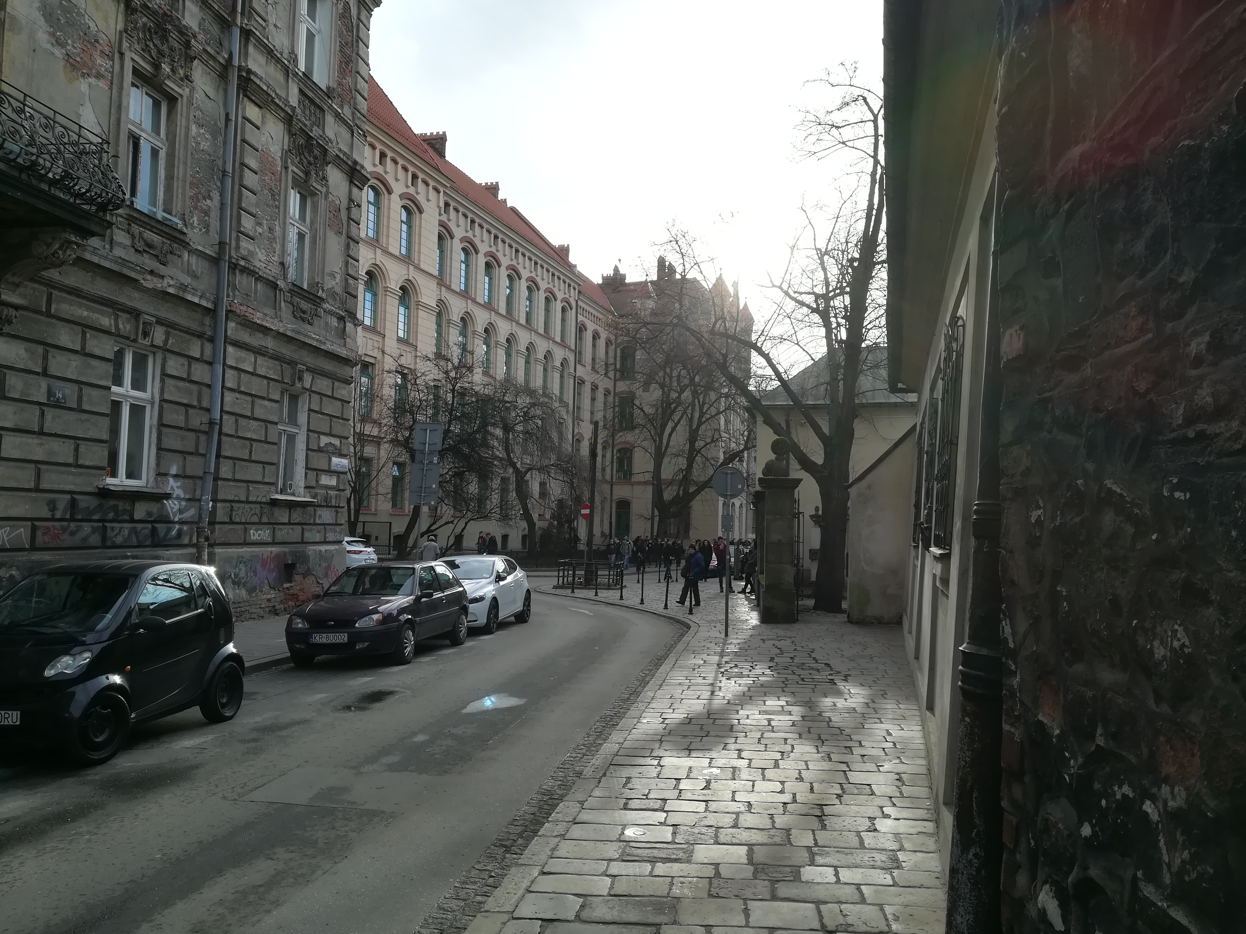 Loretańska ulica 16-18, Kraków